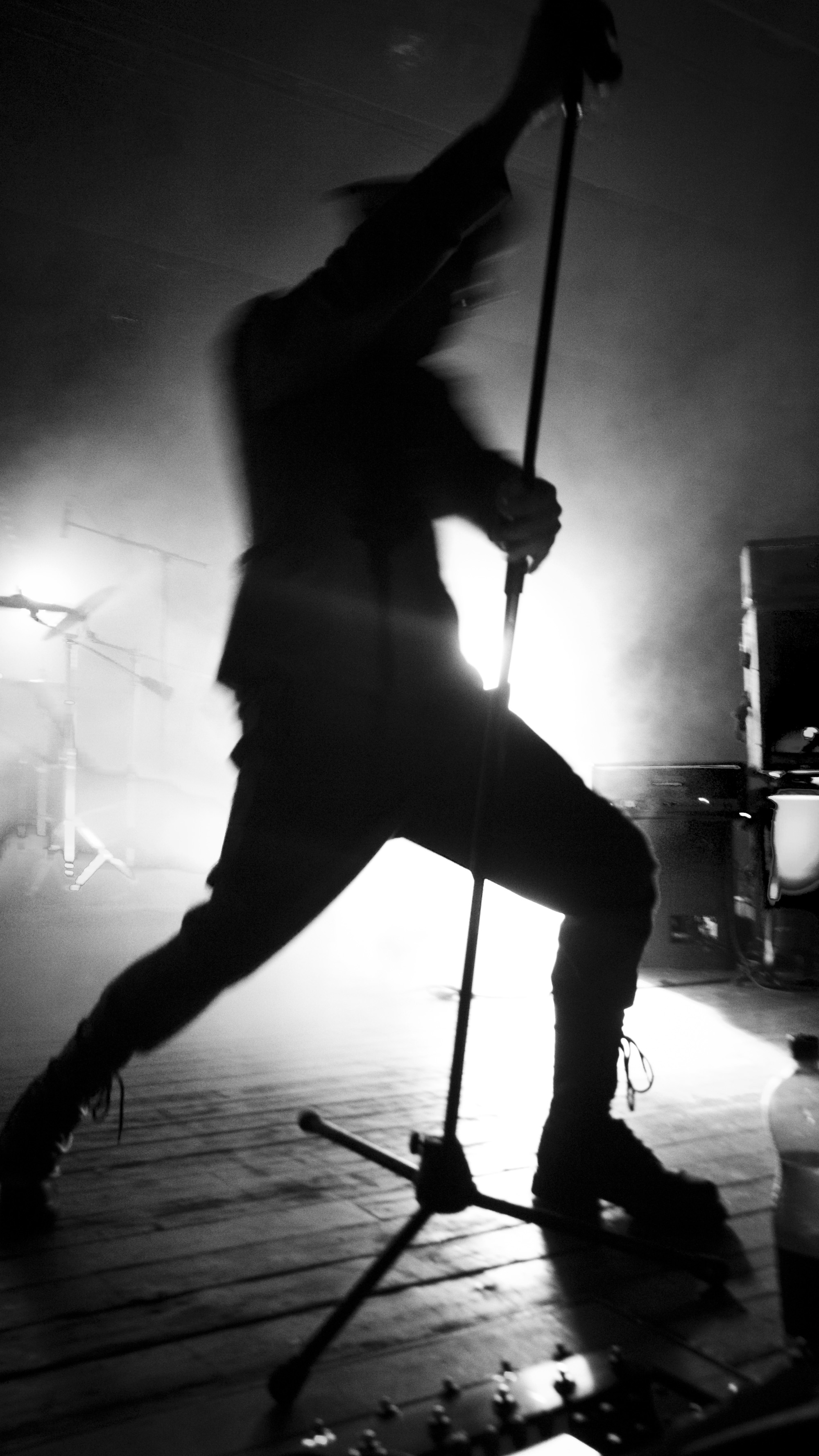 Drottnar au Elements of Rock 2013